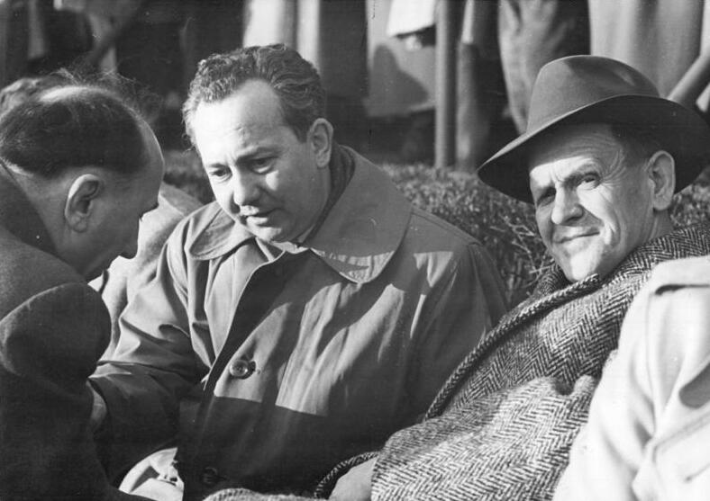 Zentralbild-Bey.-Wend. Kein-Qu 11.4.56 Stelldichein der besten Fußballer der DDR - Zu einem Übungsspiel trafen sich am 11.4.1956 im Berlin Jahn-Stadion die A- und B-Auswahl der DDR, um vor den Augen der westdeutschen Trainer Herberger und Gawliczek und den Fachleuten der DDR ihr Können zu beweisen und vielleicht Berücksichtigung in der gesamtdeutschen Olympiamannschaft zu finden. UBz. Von rechts nach links: Bundestrainer Herberger, Spielausschussvorsitzender des DFB Körfer und Berendt vom Staatlichen Komitee für Körperkultur und Sport.